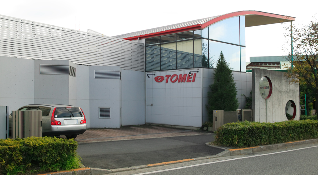 Tomei Powered